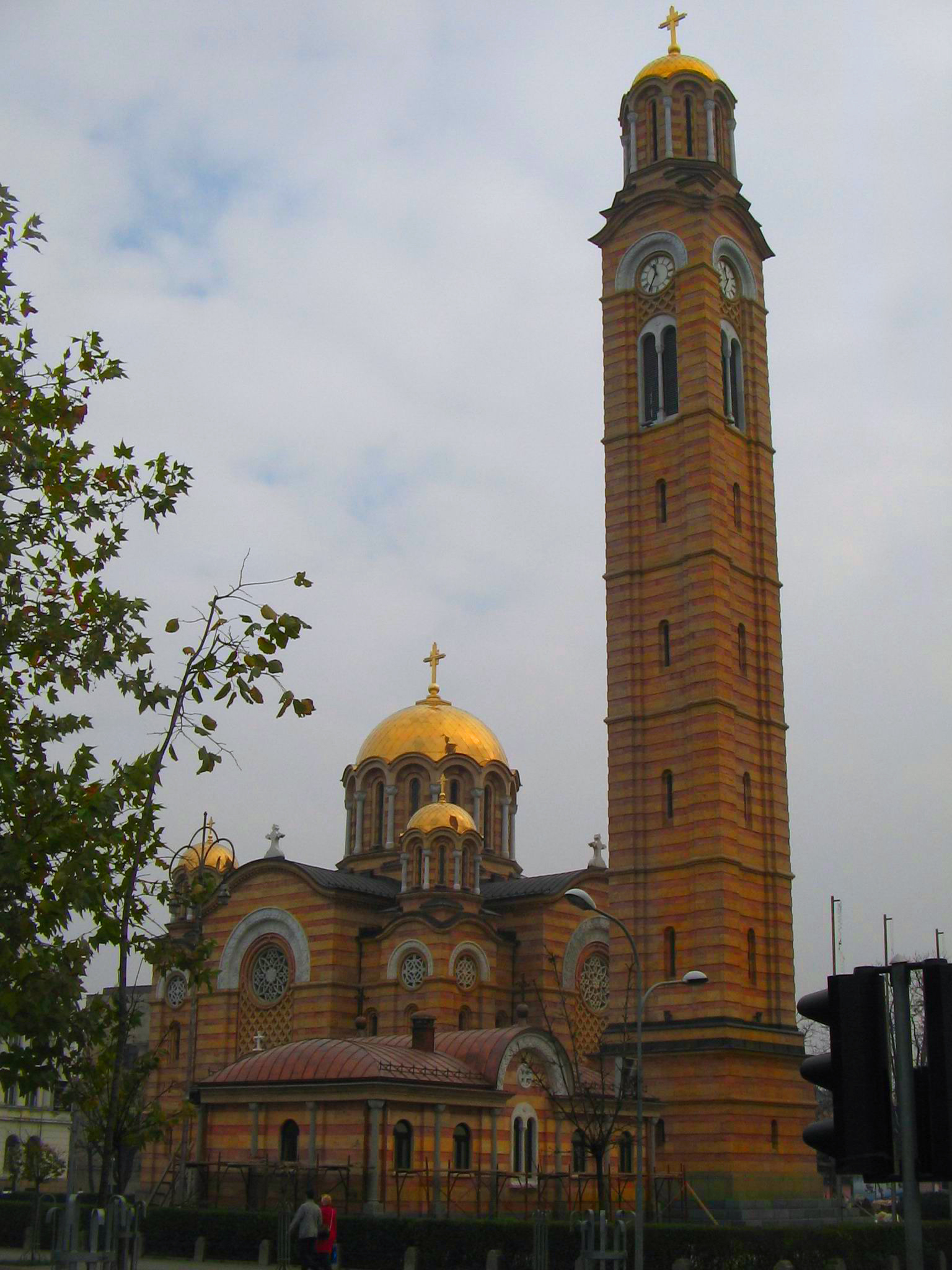 Hram Hrista_Spasitelja